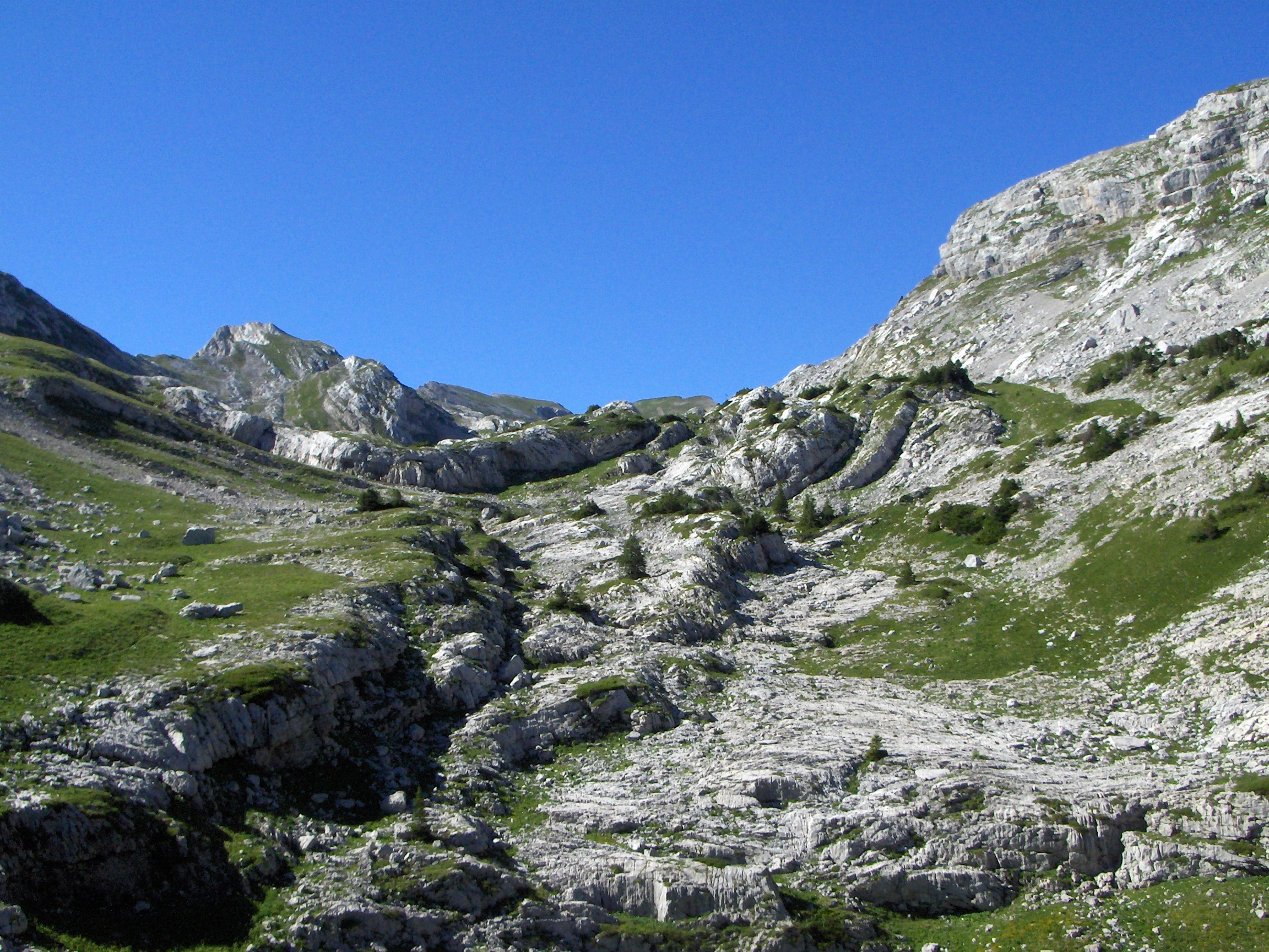 photo du début du vallon du clot d'aspres